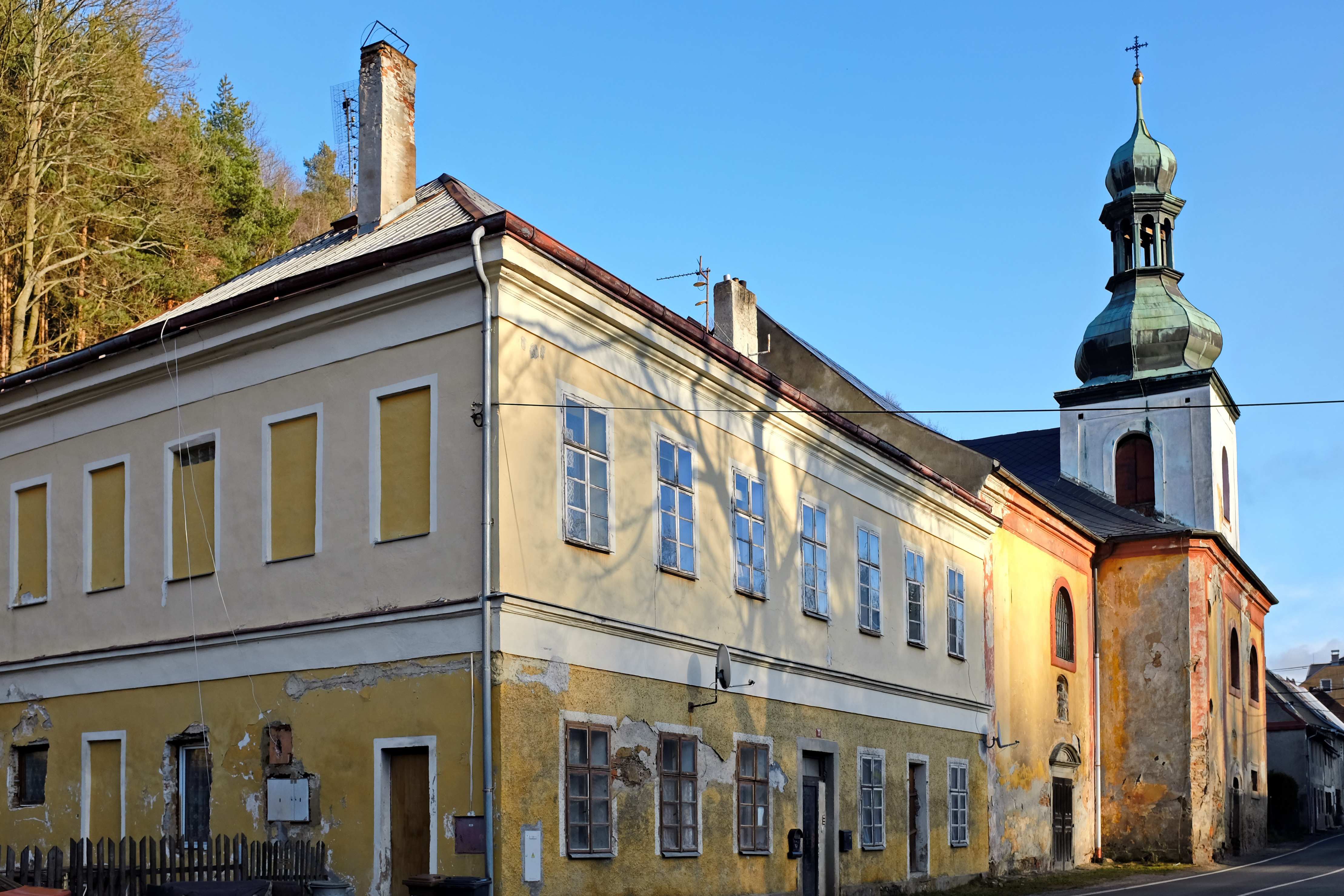 Horní Slavkov, kostel svaté Anny